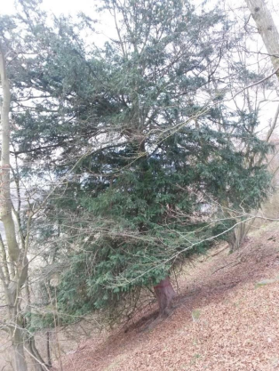 Zdroj: Monitoring Taxus baccata v národní přírodní rezervaci Chlumská stráň na Křivoklátsku